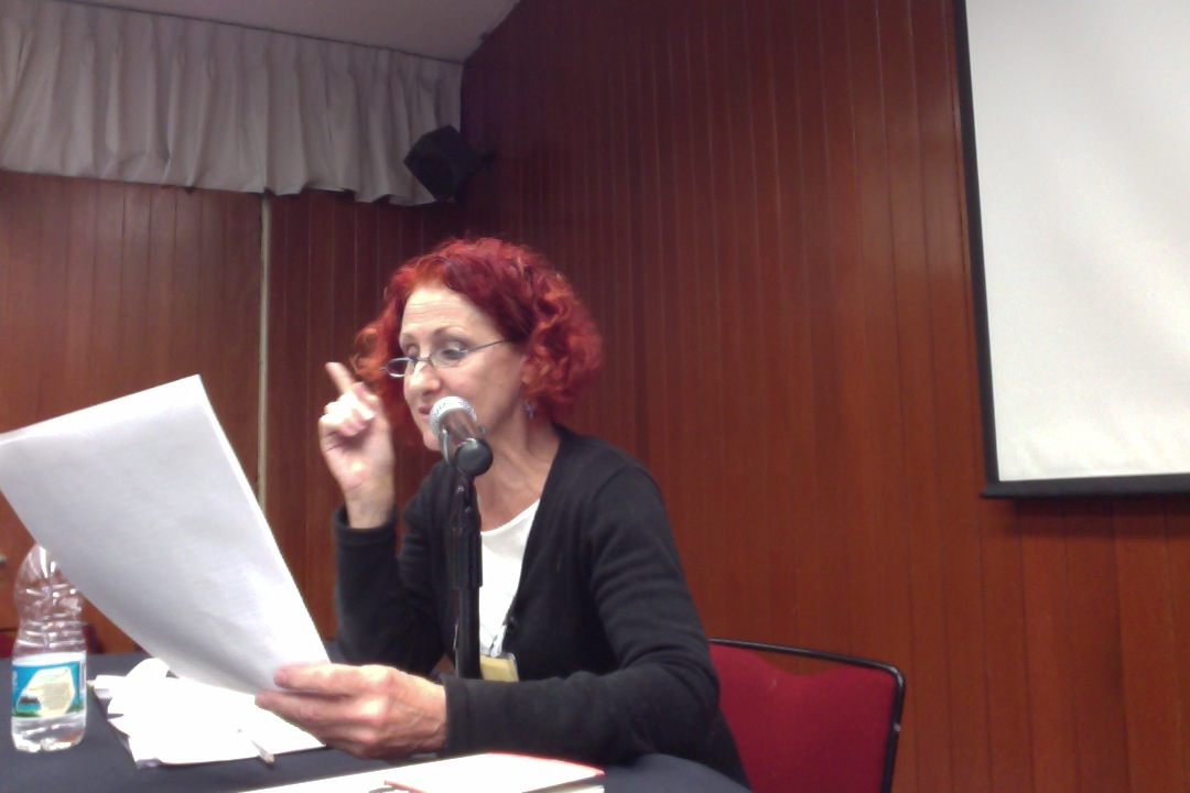 Ana María Martínes de la Escalera en las II Jornadas latinoamericanas de retórica.